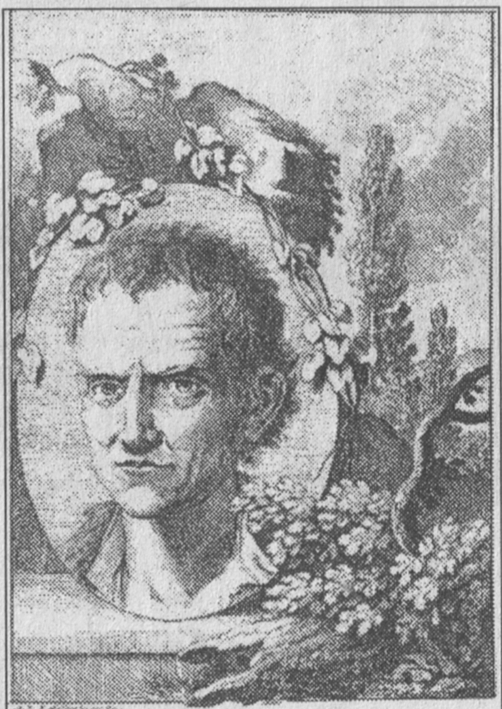 Portrait des Schweizer Kunstmalers Giovanni Battista Colomba (auch Colombo) (1634-1693).